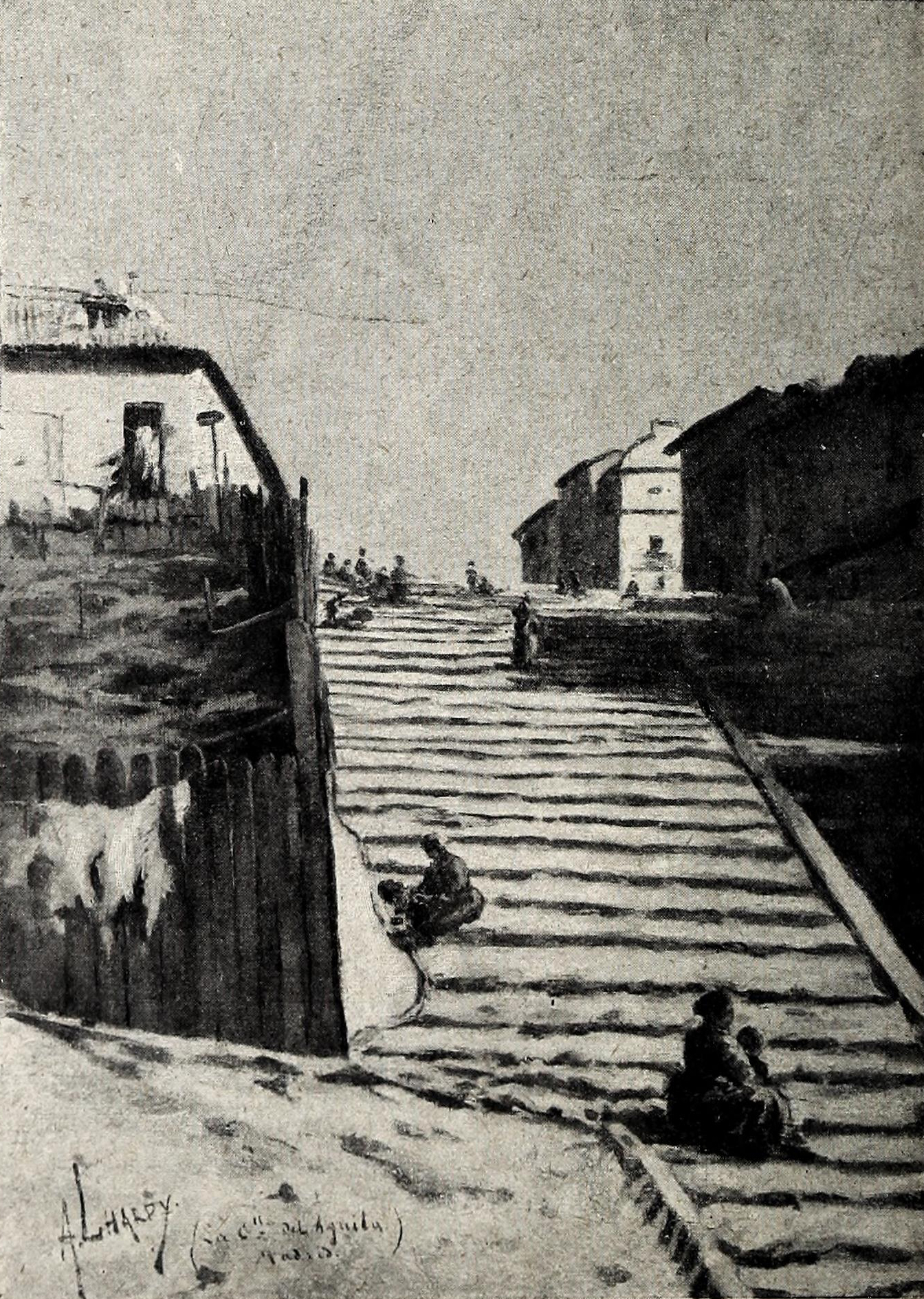 Rincones de Madrid. La calle del Águila.